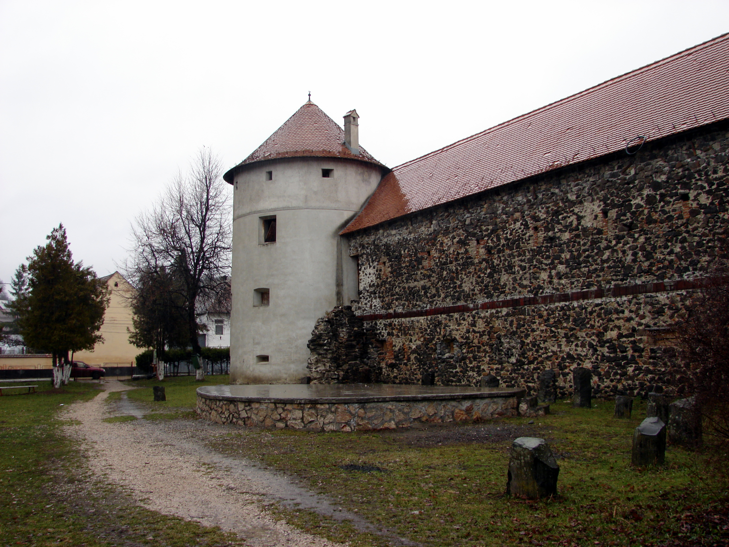 Ansamblul castelului Sükösd-Bethlen